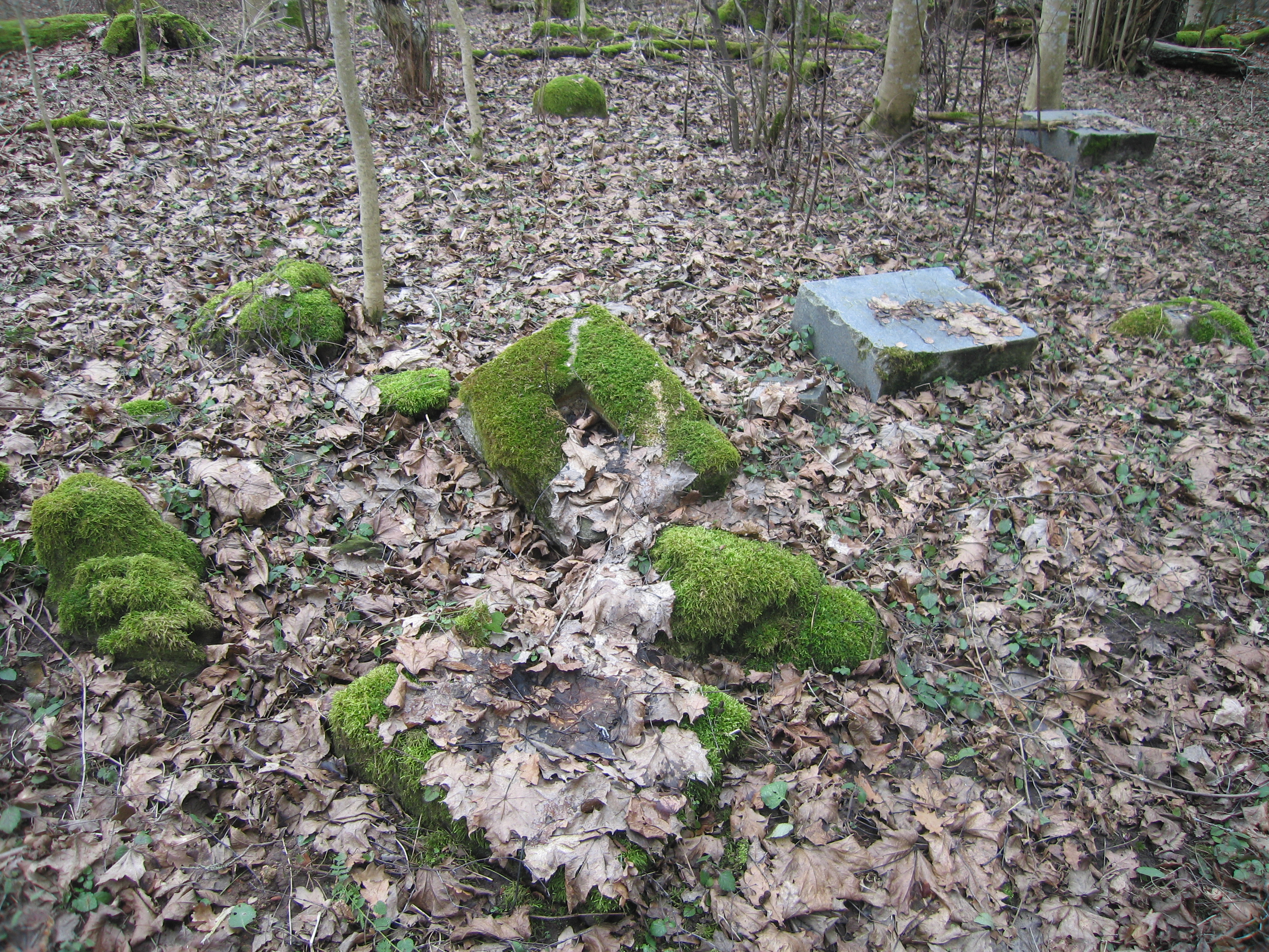 Hauatähised kalmistul, paremal on Jenny von Anrepi haud